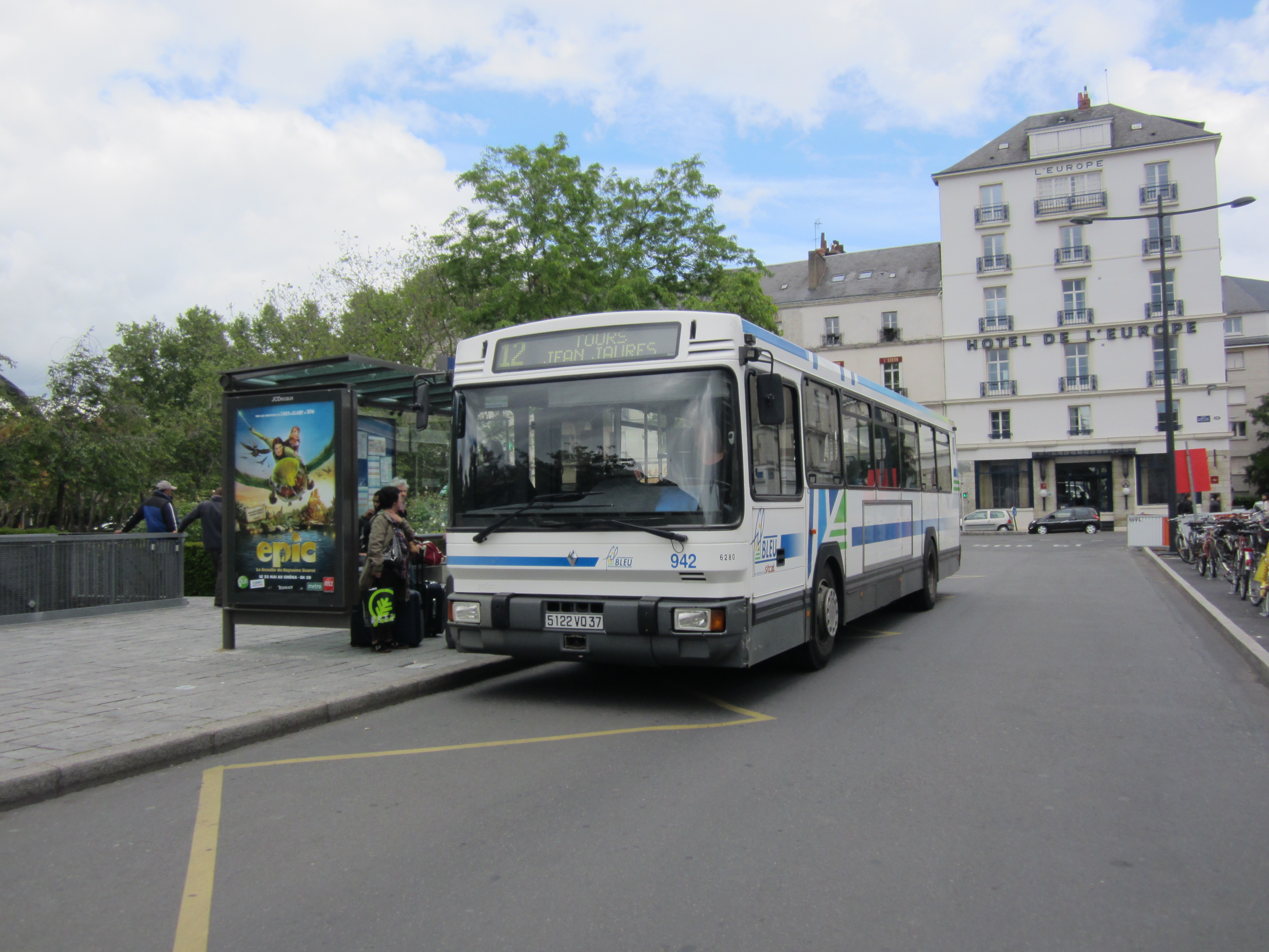 Renault PR112 n°942 sur la ligne 12 du réseau Fil Bleu de Tours, devant la Gare de Tours.